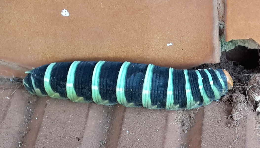 Larva de Paschyla syce (fase pré-pupa) em Gusano/Oruga.